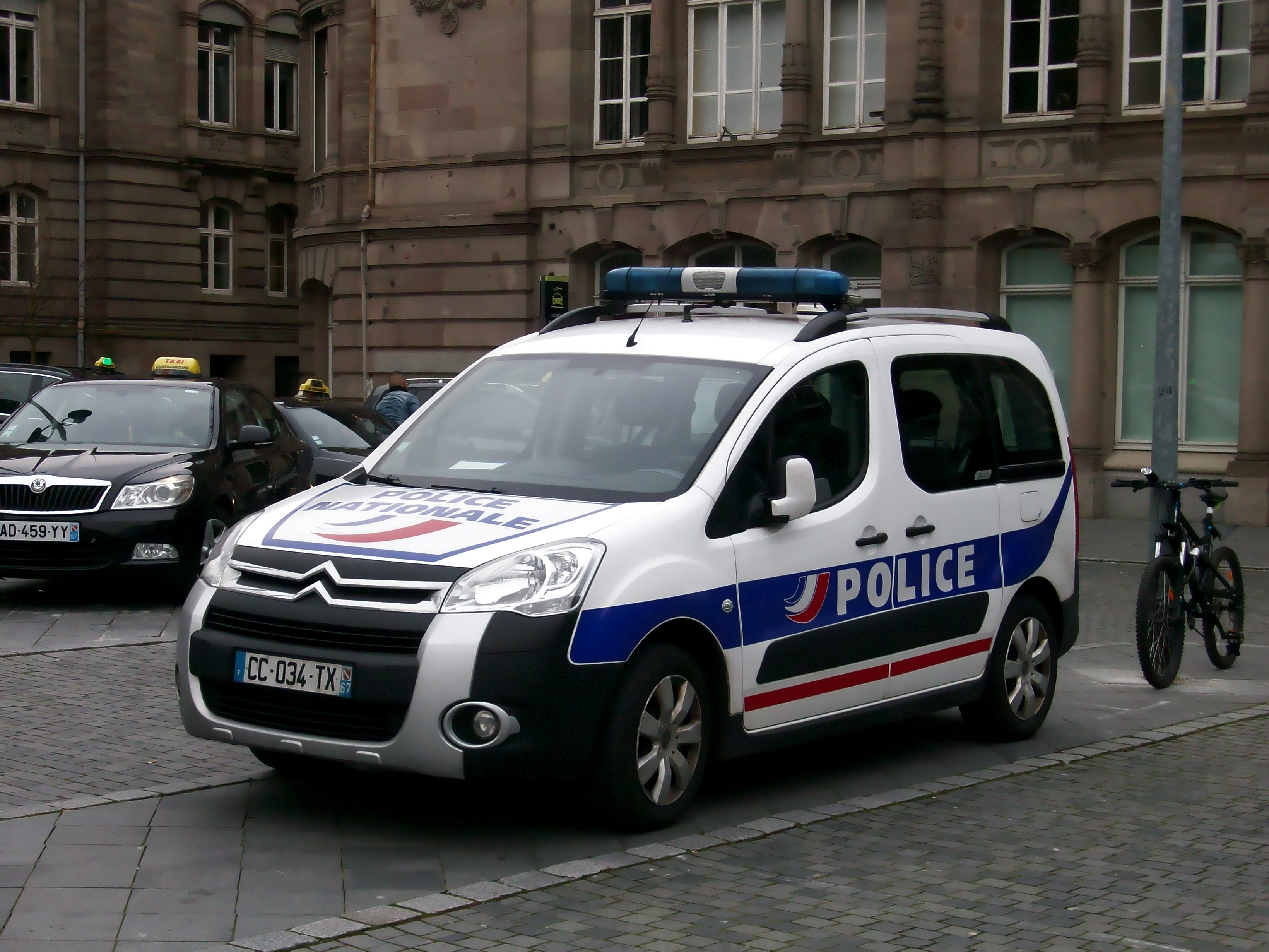 Citroën Berlingo de la police place de la gare, Strasbourg en février 2014